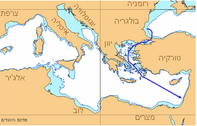 אוניית המעפילים מדינת היהודים - מסלול